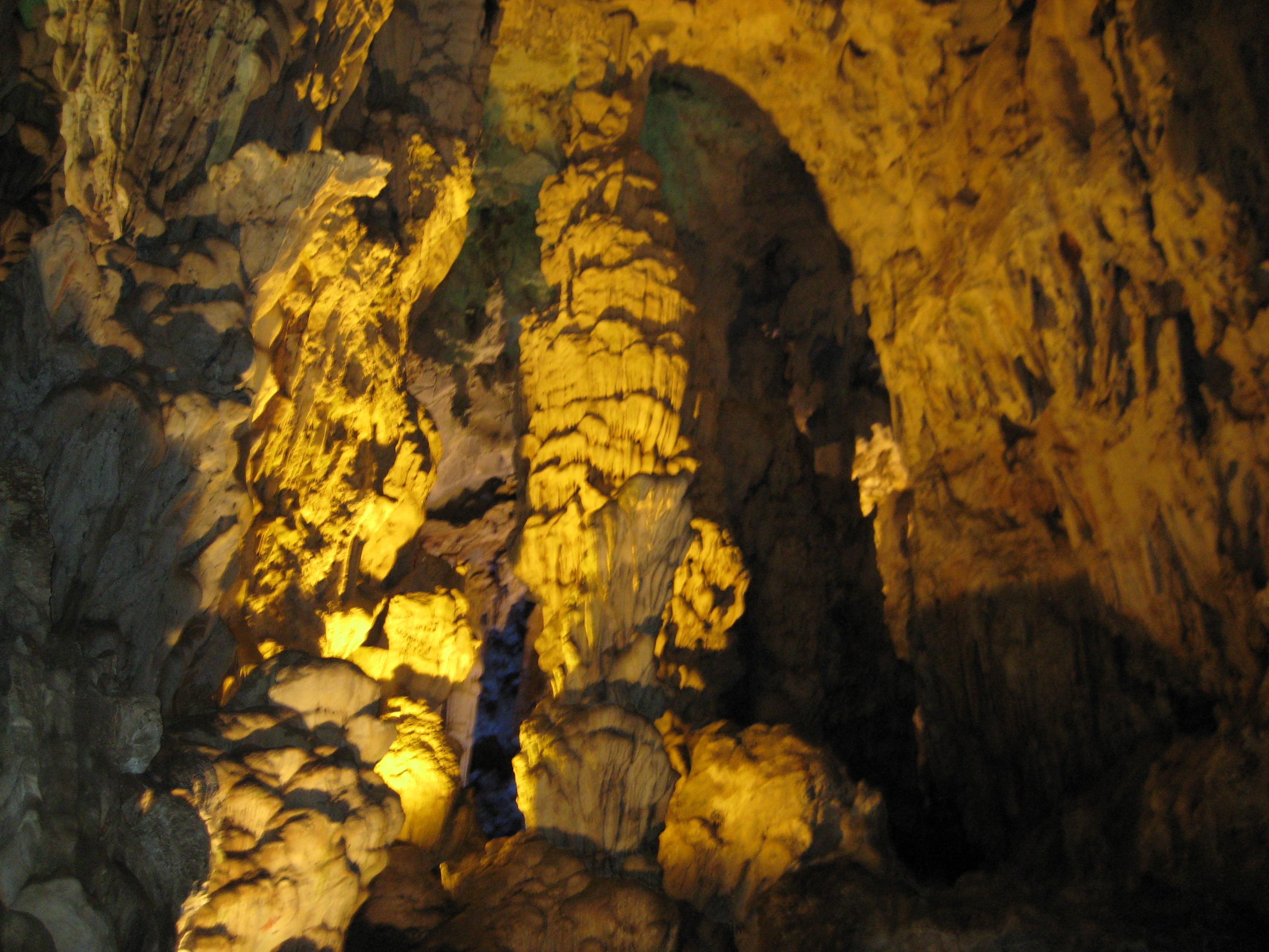 nhũ đá lấp lánh ở động Vân Trình thuộc tỉnh Ninh Bình